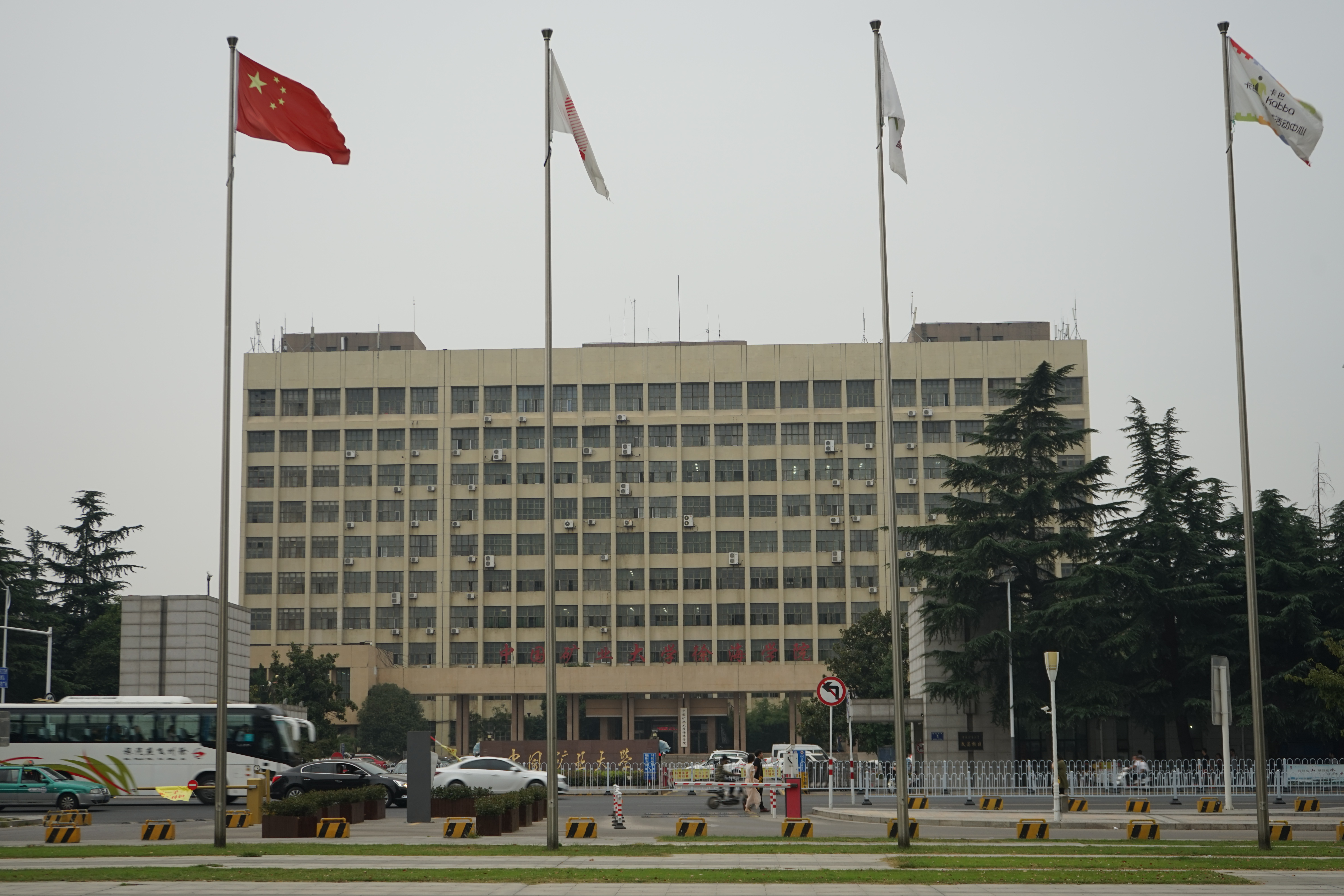 中文（中国大陆）: 徐州中国矿业大学文昌校区北门